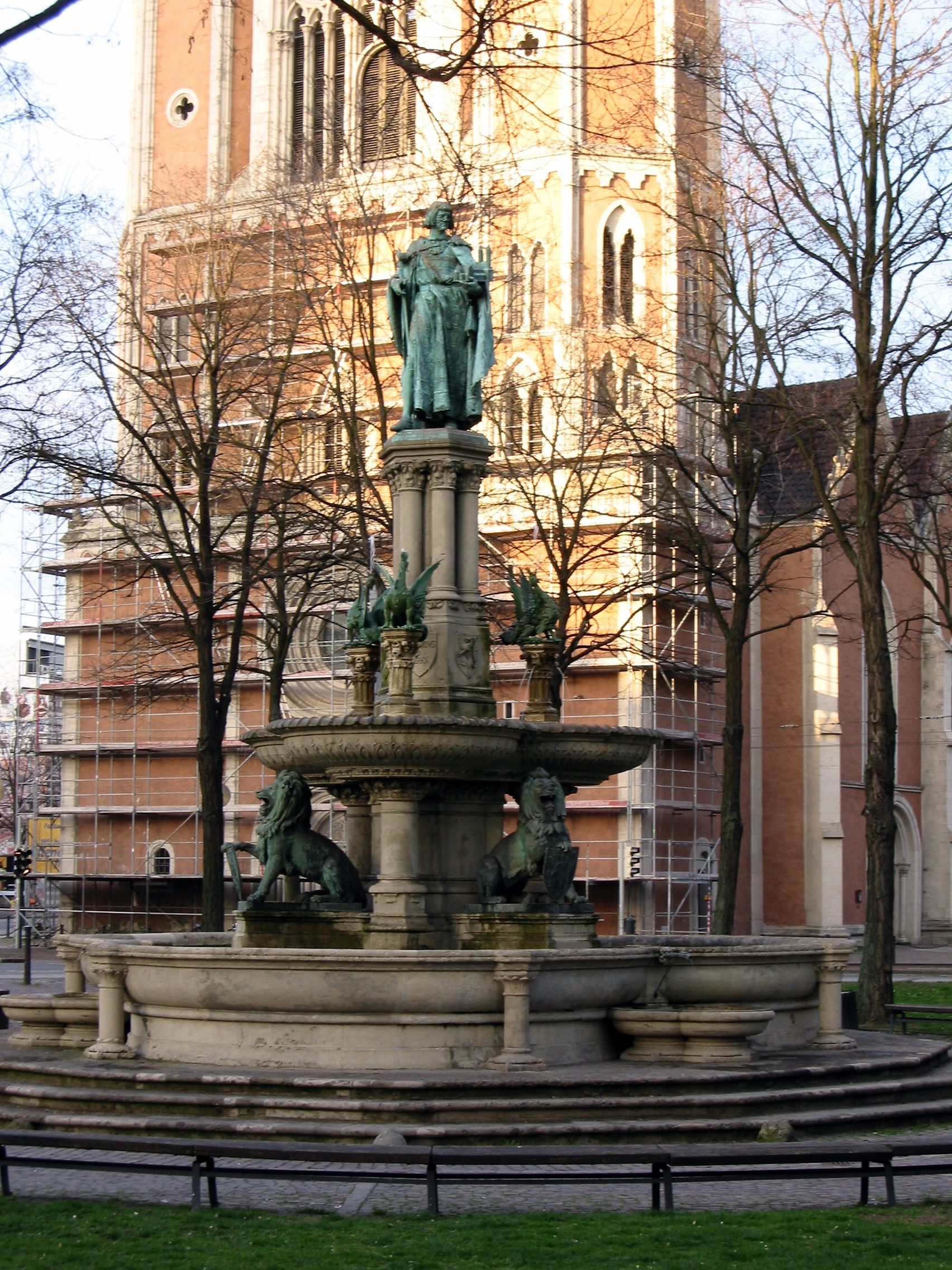 Braunschweig, Heinrichsbrunnen